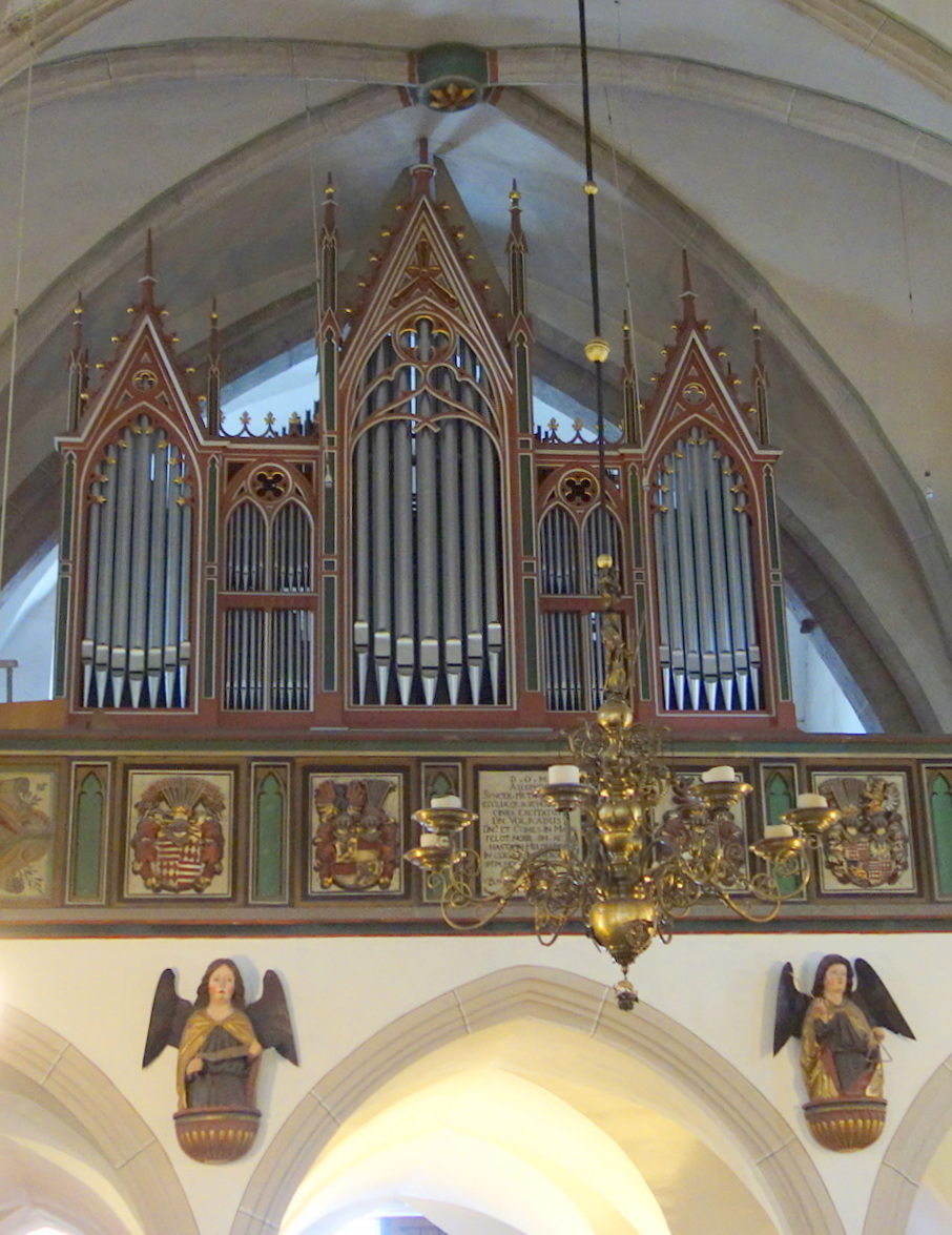 Orgel der St.-Andreas-Kirche Eisleben, Landkreis Mansfeld-Südharz, Sachsen-Anhalt, Deutschland